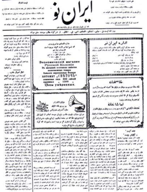 İran-nou, 1909-1910